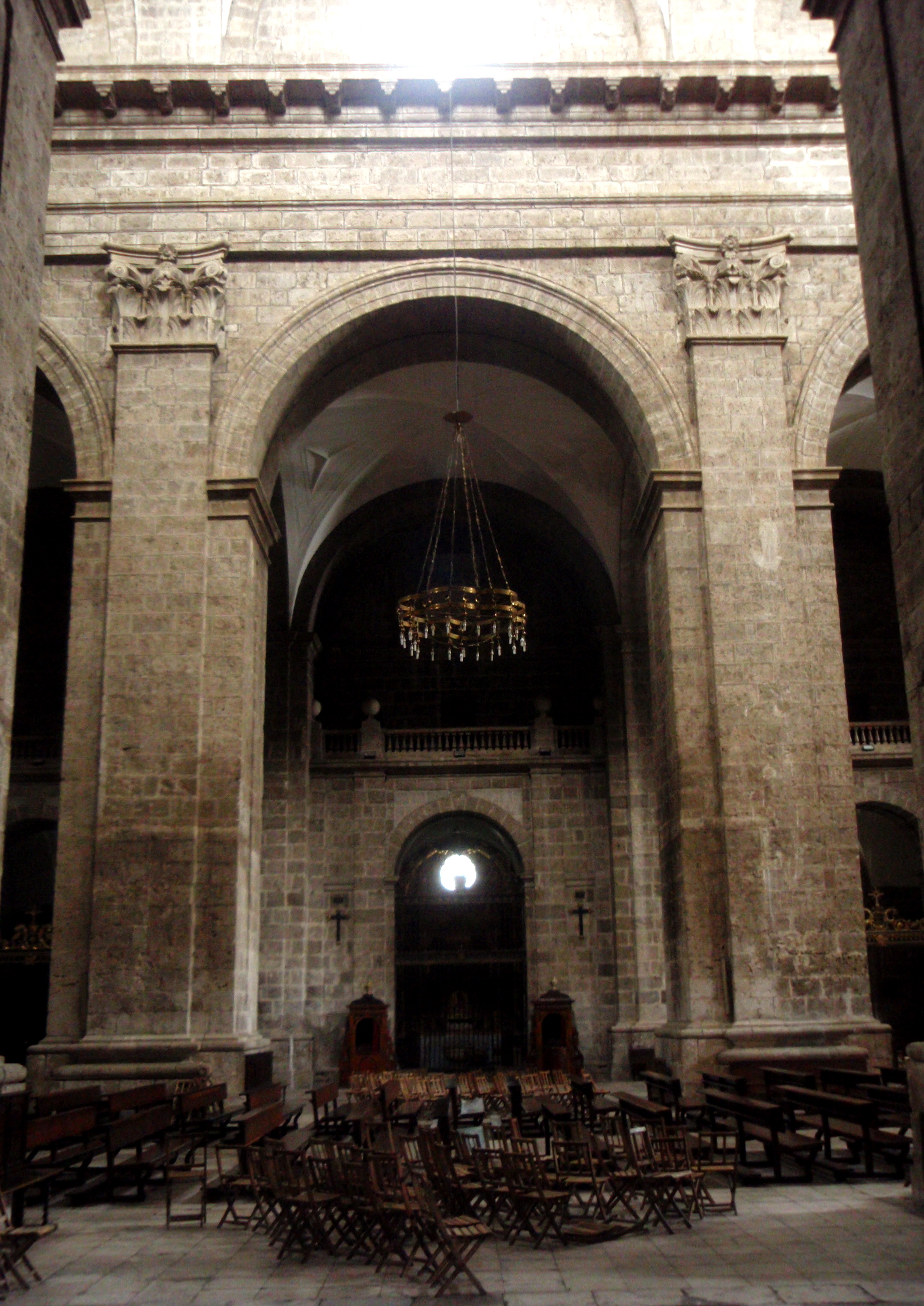 Catedral de Valladolid (España). Vista del interior, mostrando el alzado de un tramo de la nave principal y cierre de las capillas-hormacinas, con la tribuna sobre la entrada a las mismas.